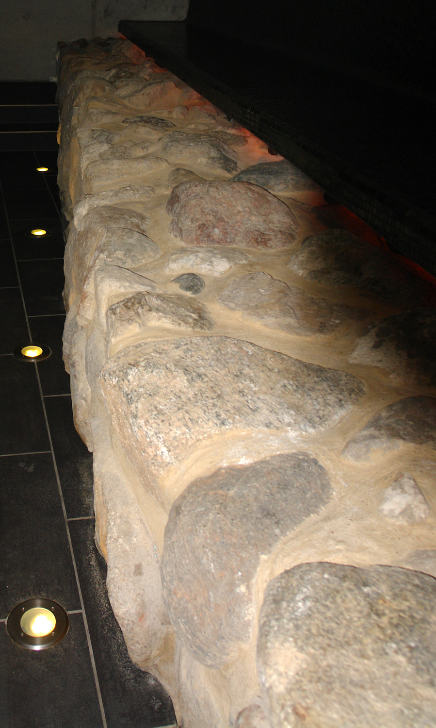 Mauerreste eines um 1183 errichteten Steingebäudes an der Schlachte in Bremen (Langenstr. 72, Hotel Überfluss)